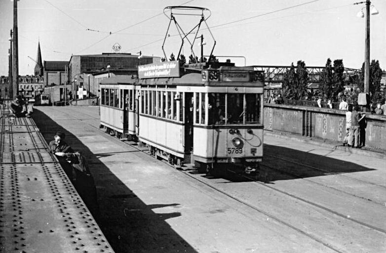 Berlin, Treskowbrücke, Straßenbahn Zentralbild Sturm 4 Motive 31.5.1955 Treskowbrücke wieder in Betrieb Nachdem die wiederhergestellte Treskowbrücke in Berlin-Schöneweide durch die Friedensfahrer eingeweiht und für Fußgänger freigegeben worden war, rollt seit den Pfingstfeiertagen auch wieder die Strassenbahn darüber. Nur der Autoverkehr ist noch gesperrt.